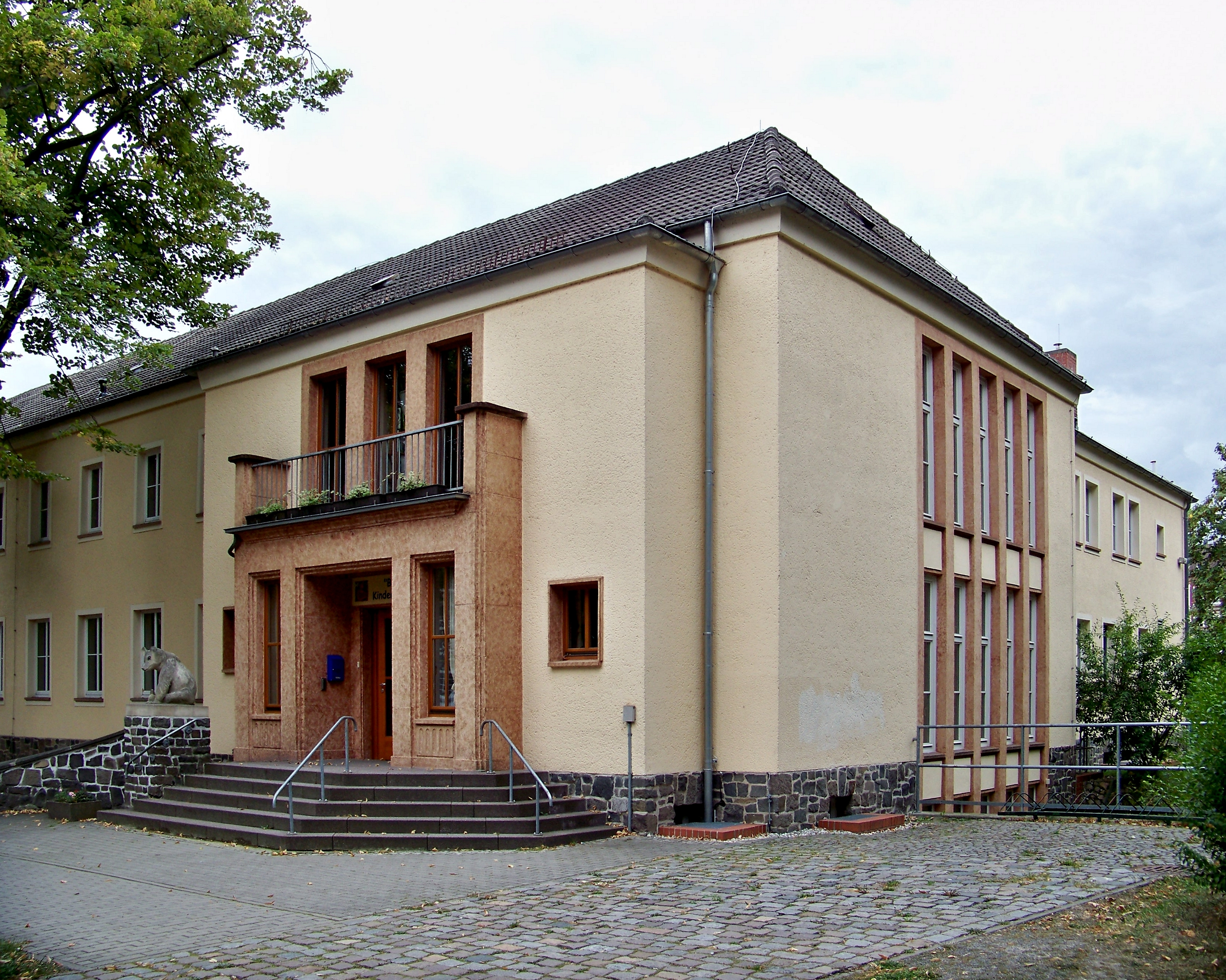 Eckansicht des Kulturdenkmals Kindergarten Röberstraße 12/13 in Eilenburg; Objektnummer: 08973361